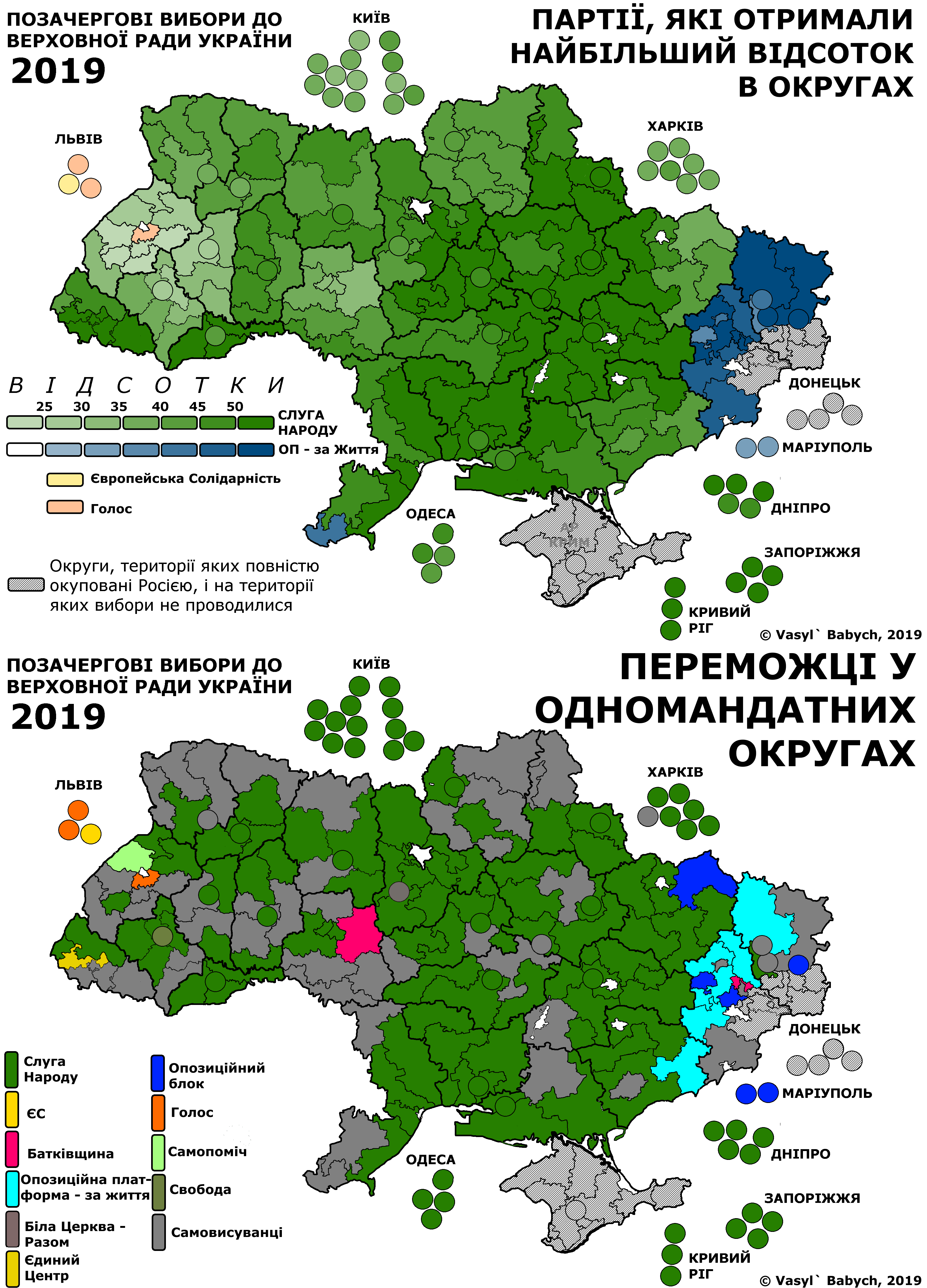 Переможці позачергових виборів до Верховної Ради України 2019 року.